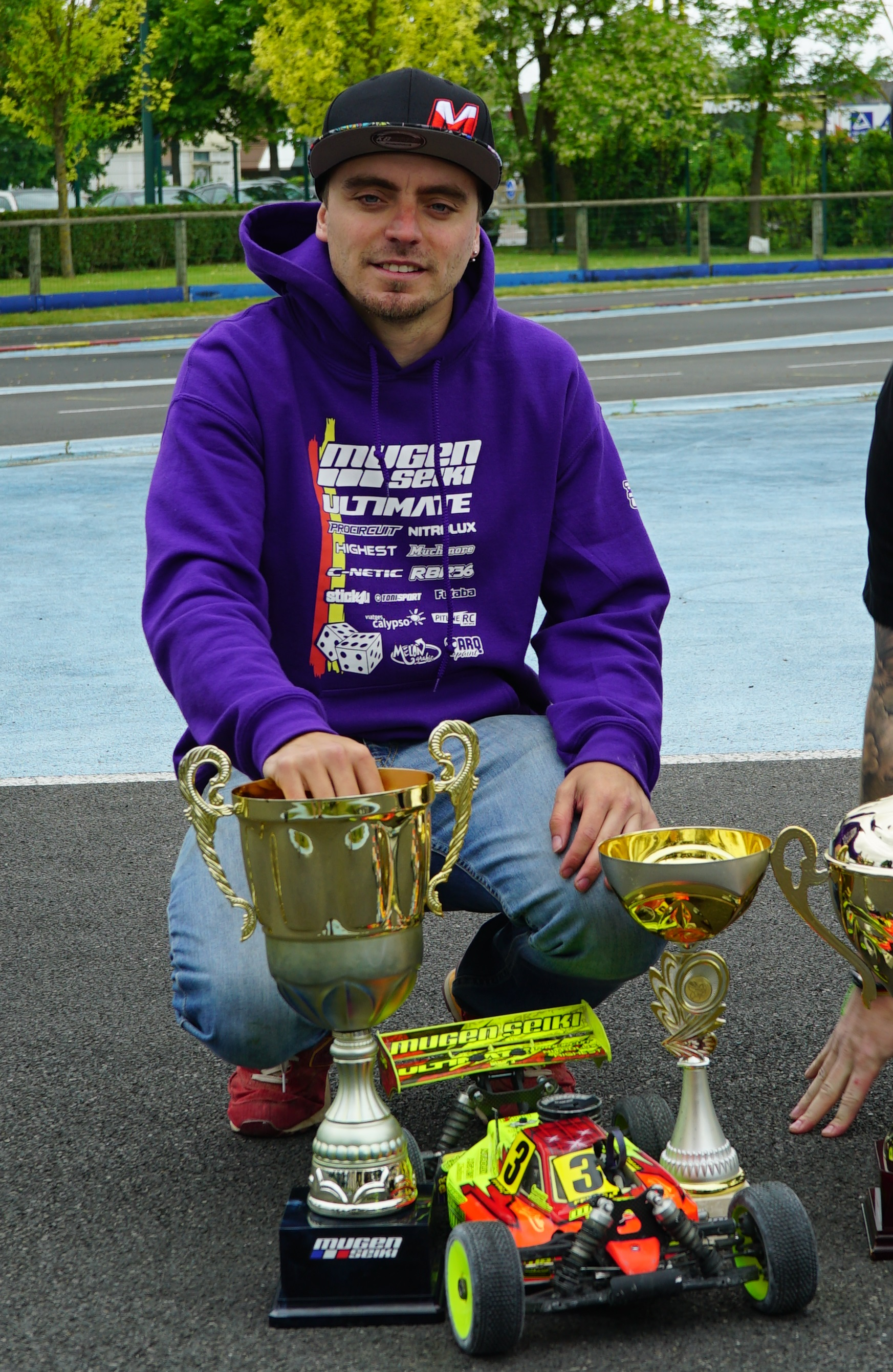 LOrs de la course radio-commandée de Reims.